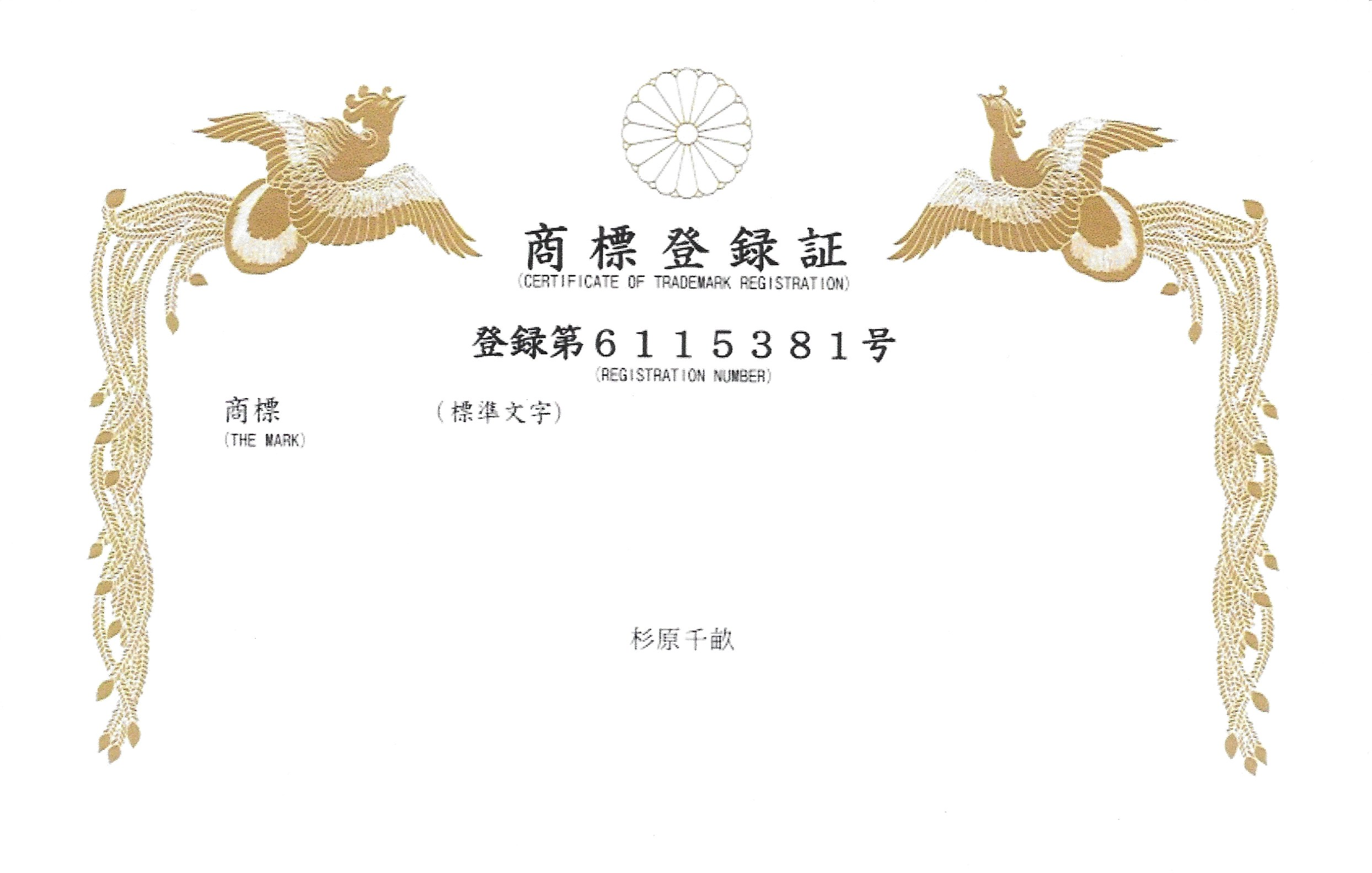 商標登録証